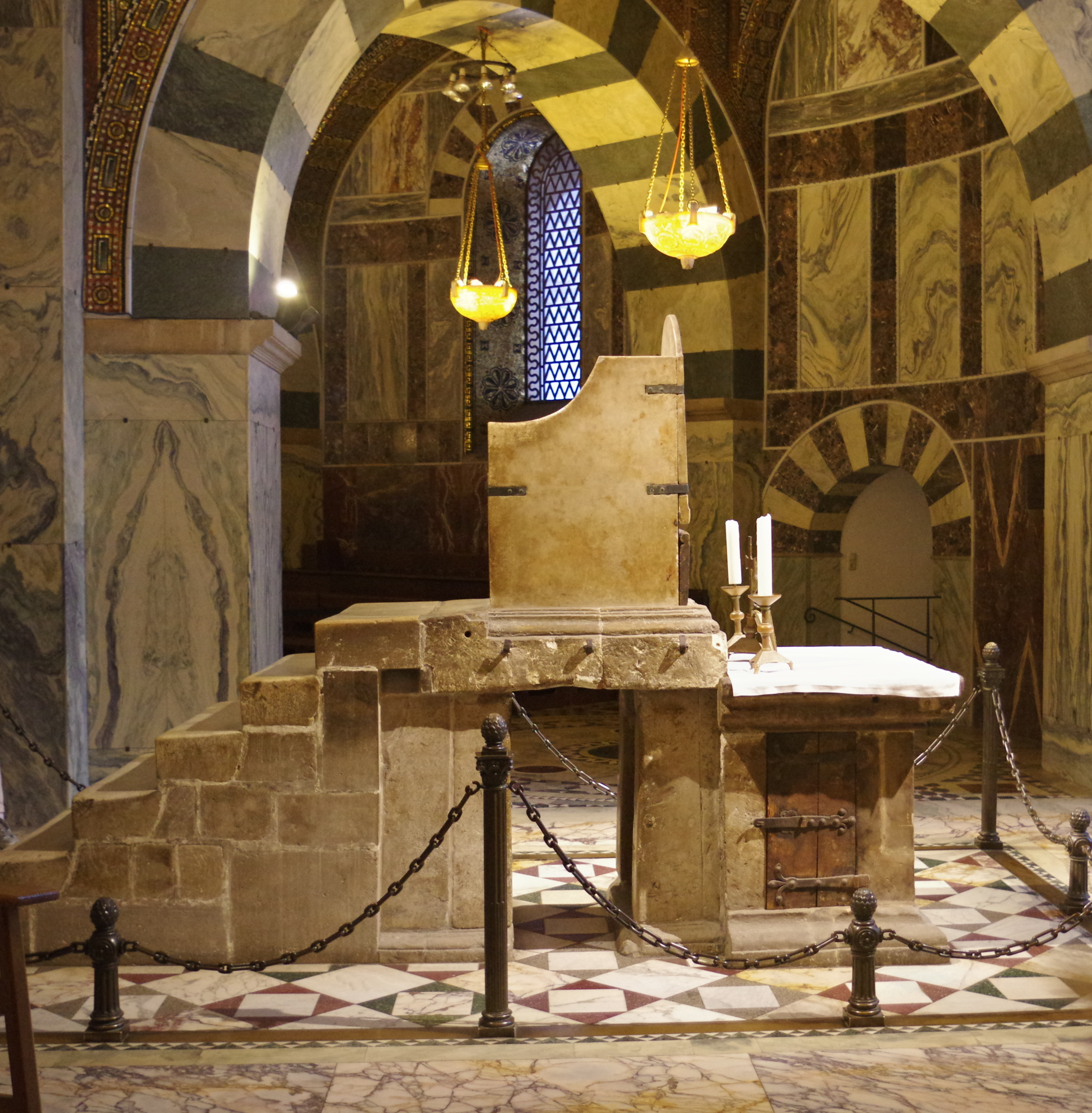 Aachener Dom, Karlsthron